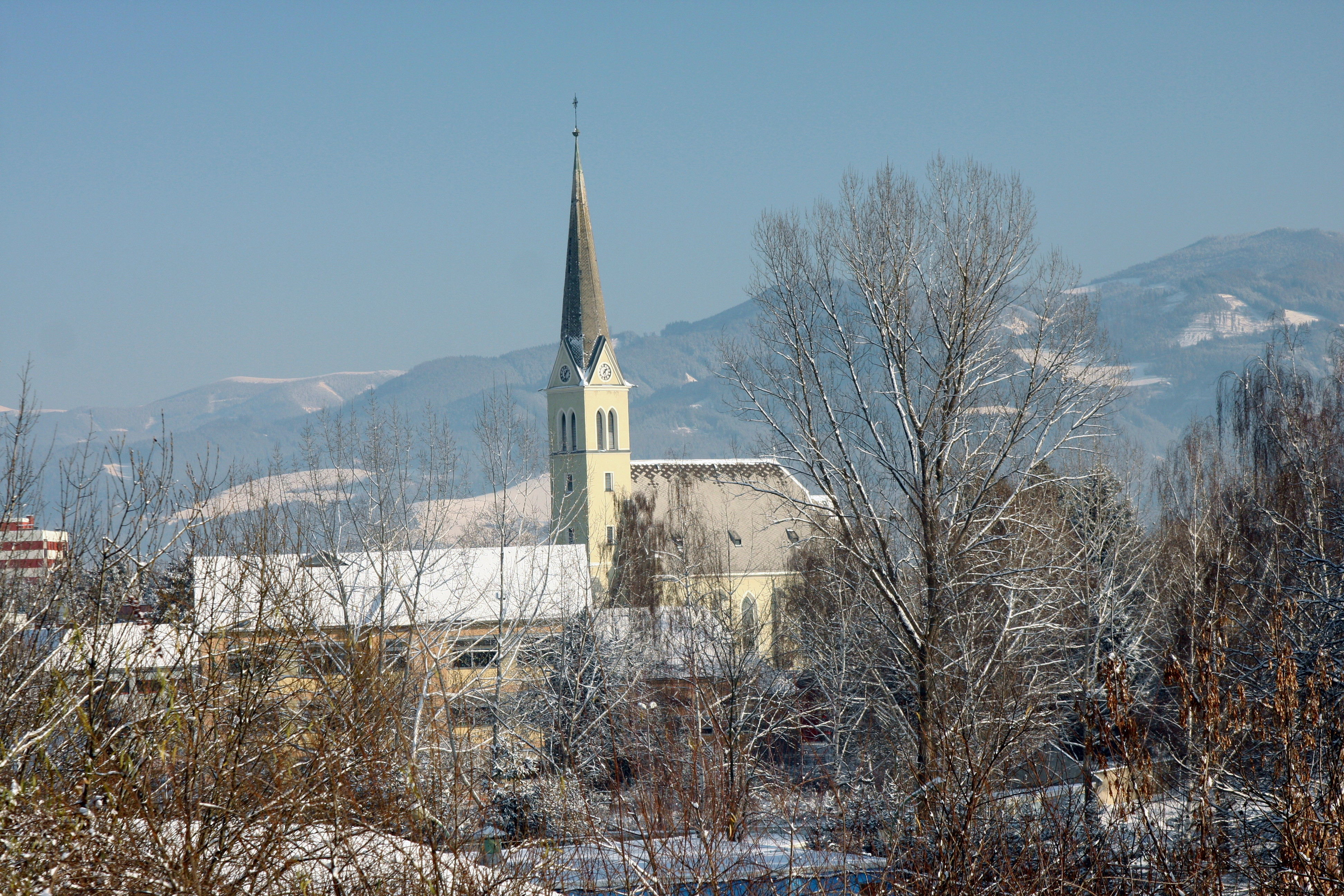 Blick auf die Stadtpfarrkirche Zeltweg im Winter